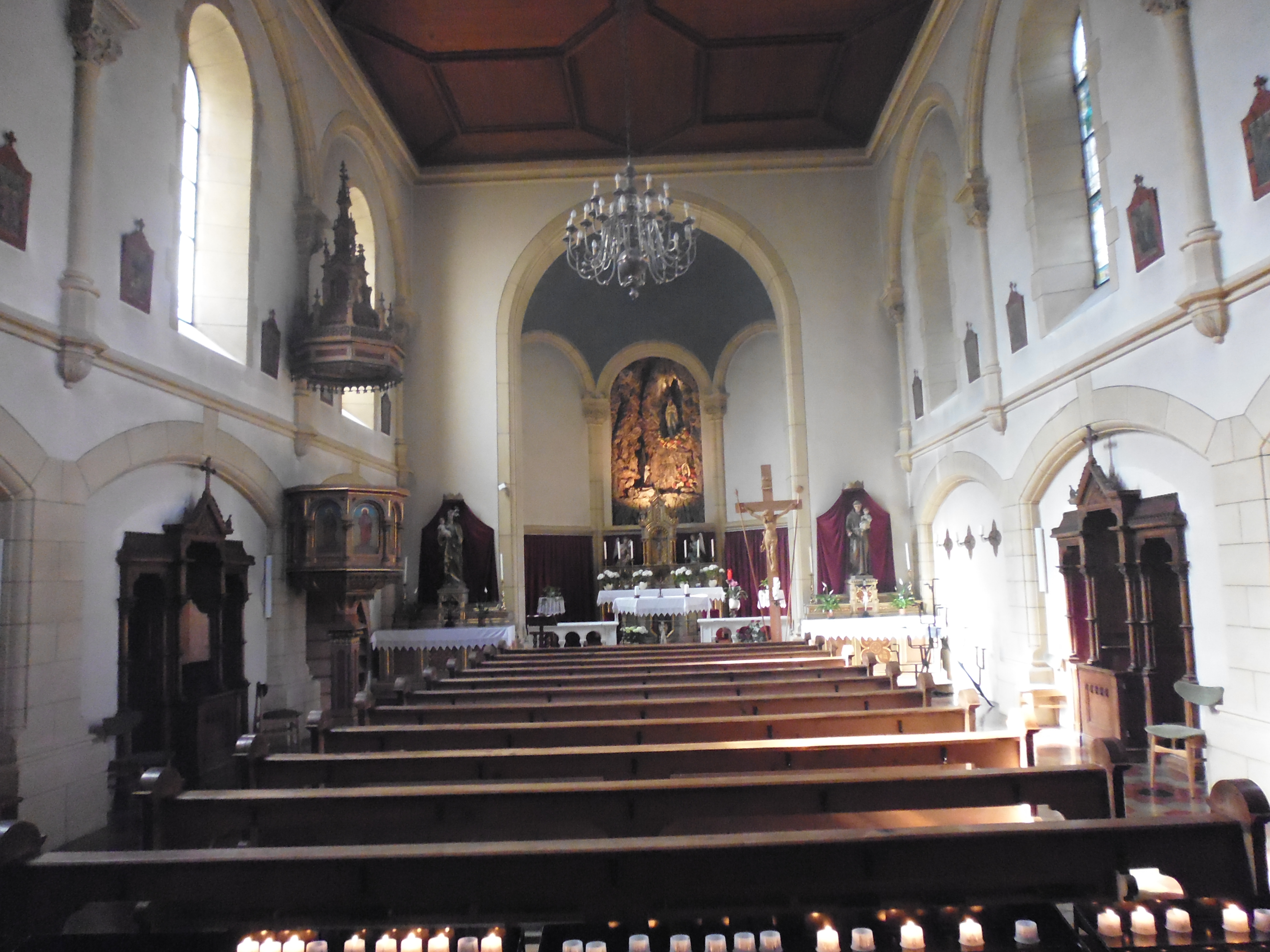 Innendetails der Wallfahrtskirche Maria Lourdes (Laas)